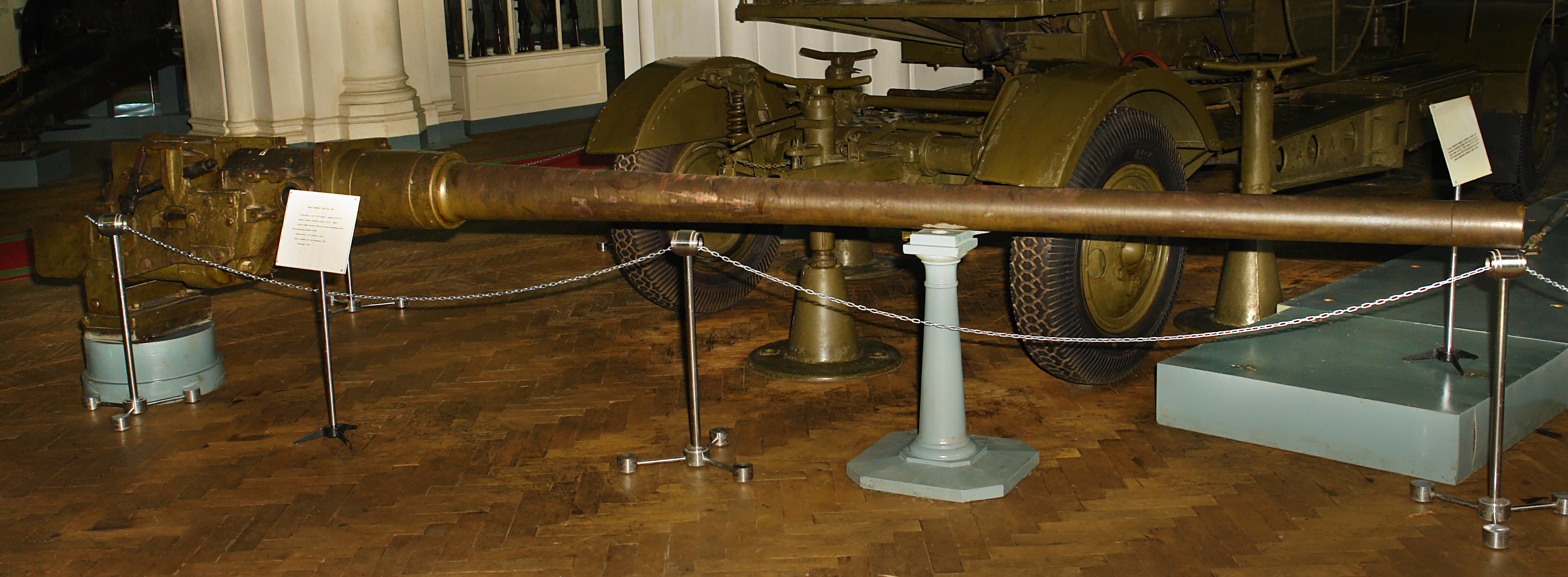 85-мм ТАНКОВАЯ ПУШКА обр. 1944 г. Устанавливалась в танке Т-34-85 спаренно с пулеметом ДТМ или ДТ. Дальность стрельбы (осколочной гранатой 0—365 к) — 13800 м. Дальность прямого выстрела —1100 м (при стрельбе подкалиберным броне-бойно-трассирующим снарядом БР-365п). Скорострельность — 5—6 выстрелов в минуту. Масса качающейся части (без бронировки) —1150 кг. Изготовлена в 1944 г. ^ Военно-исторический музей артиллерии, инженерных войск и войск связи, Санкт-Петербруг.